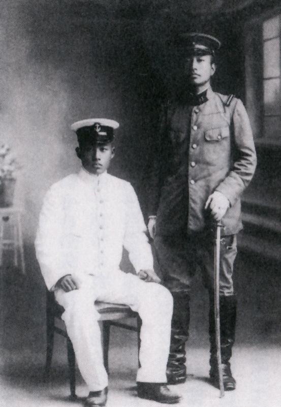 少尉に任官された直後の石原莞爾と、弟の次郎。